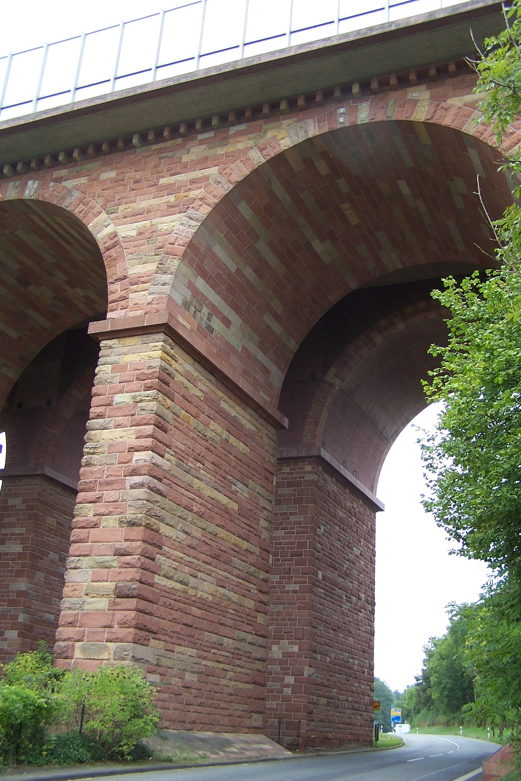 Wommen, Autobahnbrücke